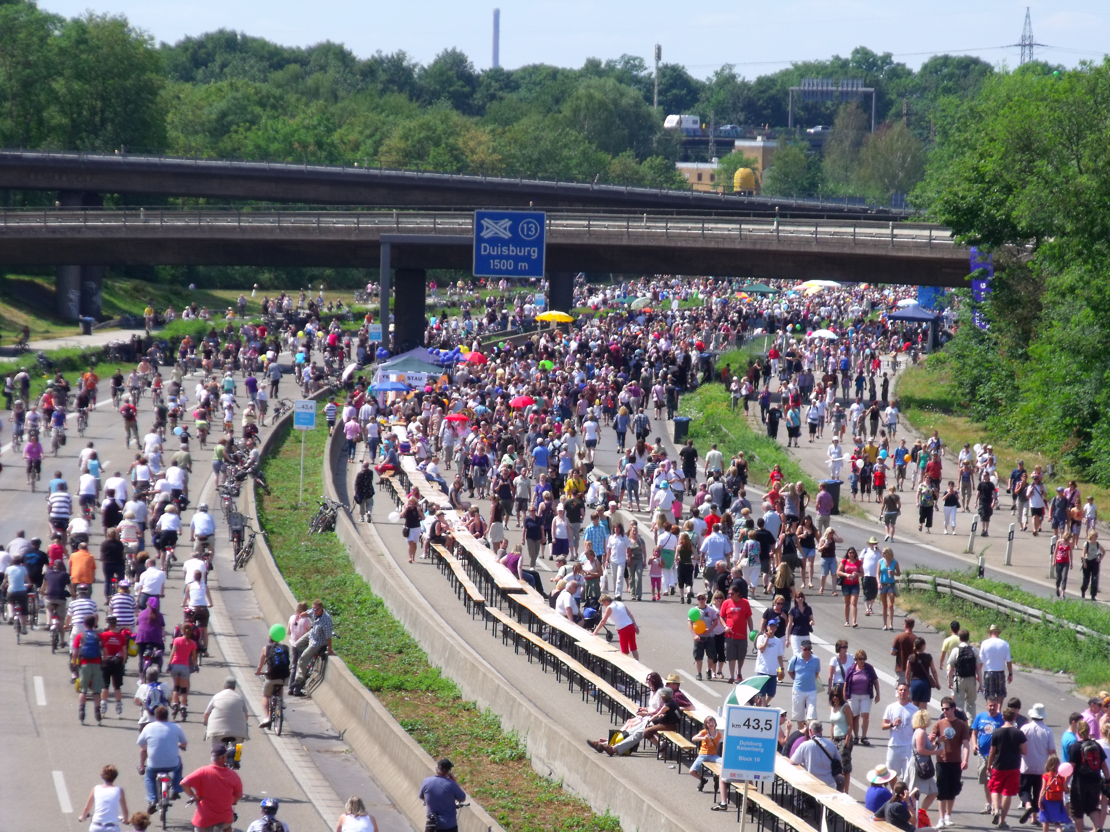 Kreuz Duisburg im Spaghettiknoten am Still-Leben Ruhrschnellweg 2010 von einer Brücke aus betrachetet